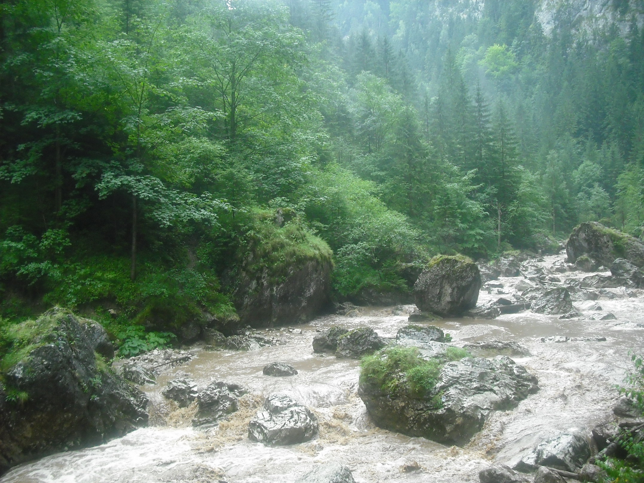 A Békás-patak eső után.